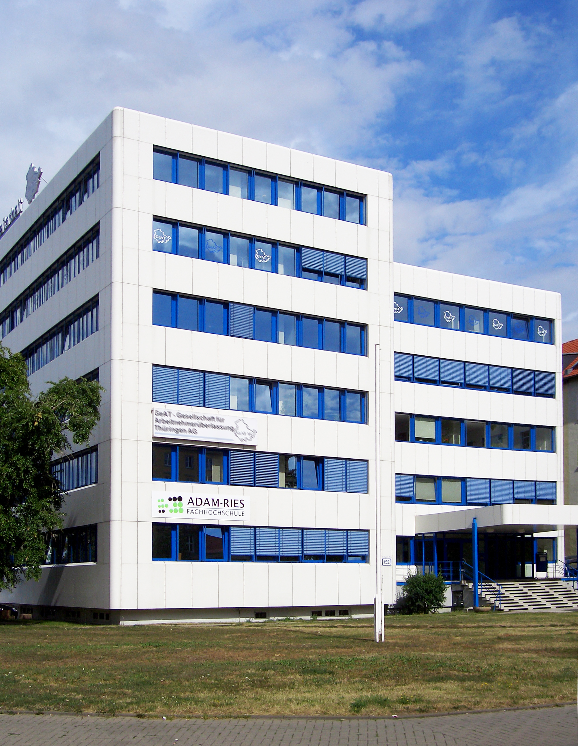 Das Gebäude der privaten Adam-Ries-Fachhochschule am Juri-Gagarin Ring in Erfurt (Thüringen).